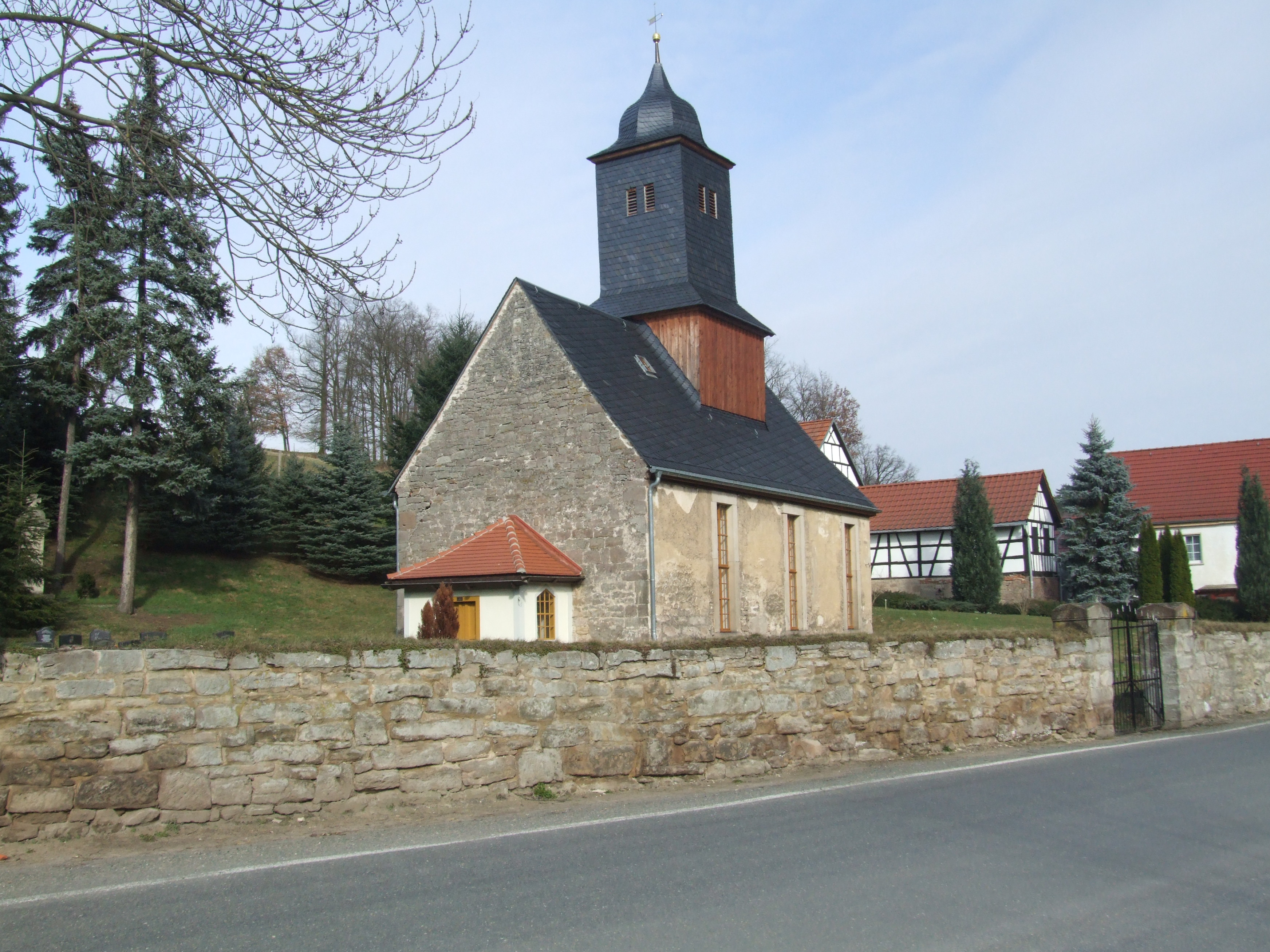 Beutelsdorfer Kirche